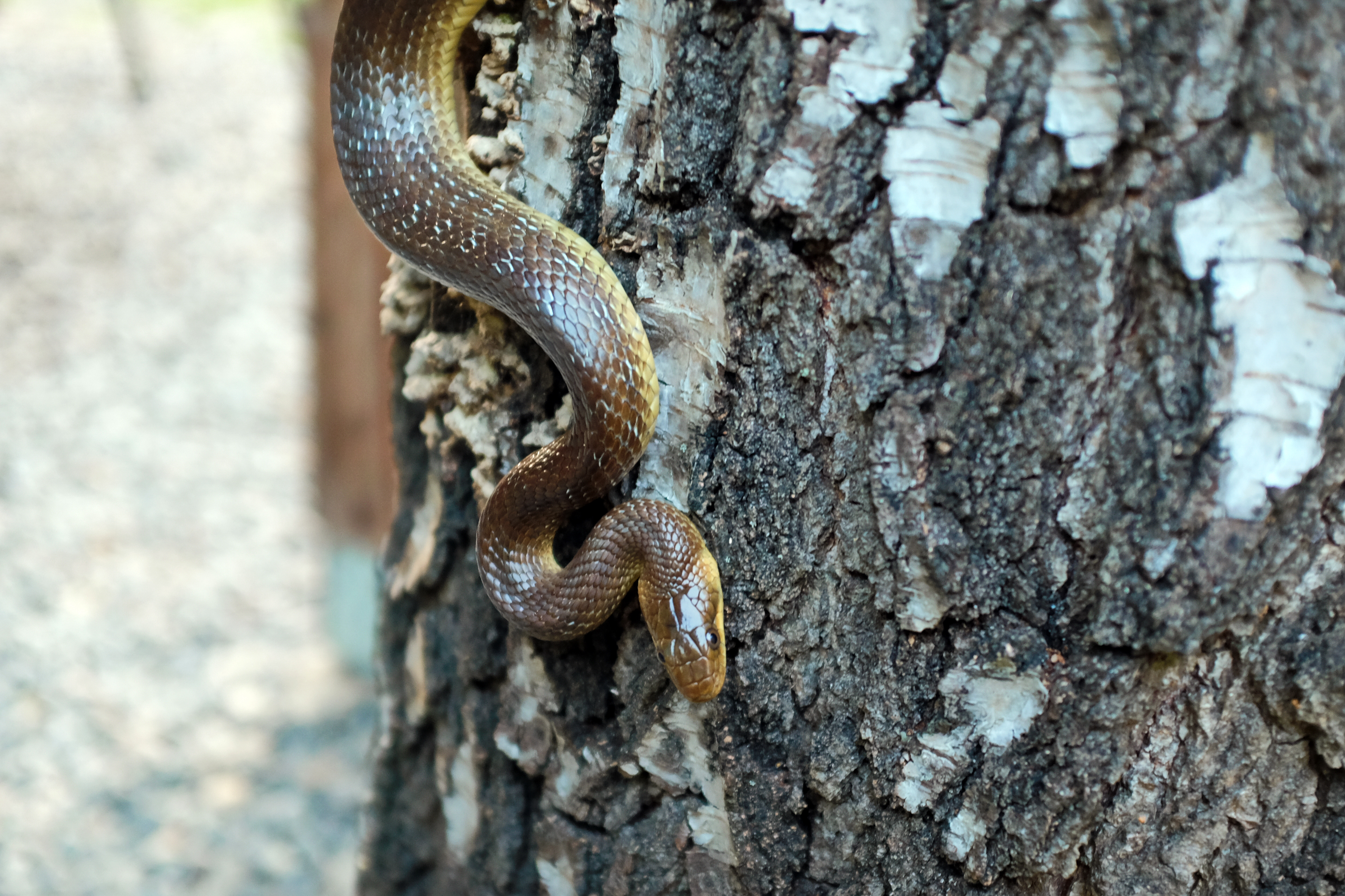 Osvinov, část obce Stráž nad Ohří, přírodovědný park, užovka stromová, okres Karlovy Vary